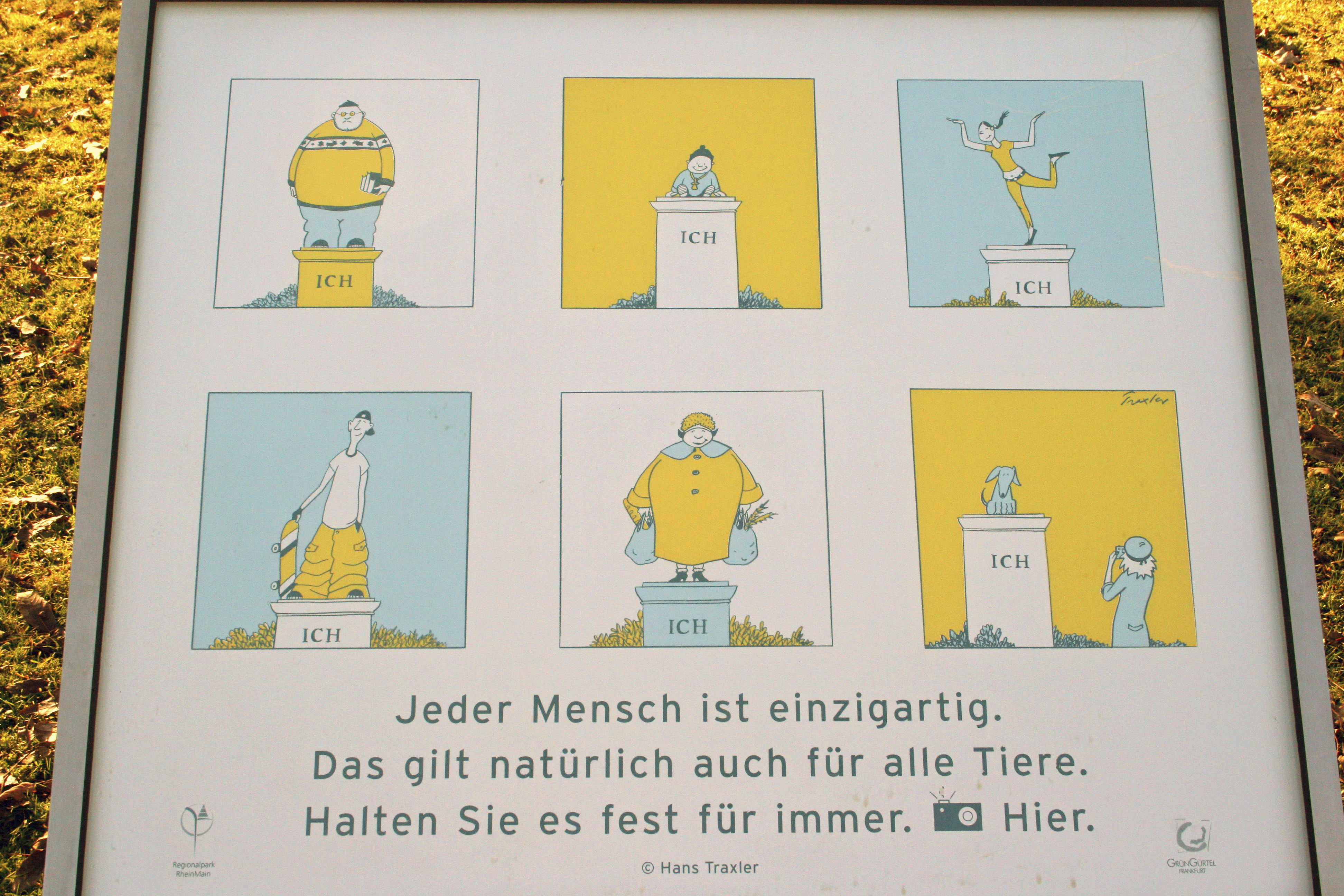 Tafel am Ich-Denkmal, Frankfurt